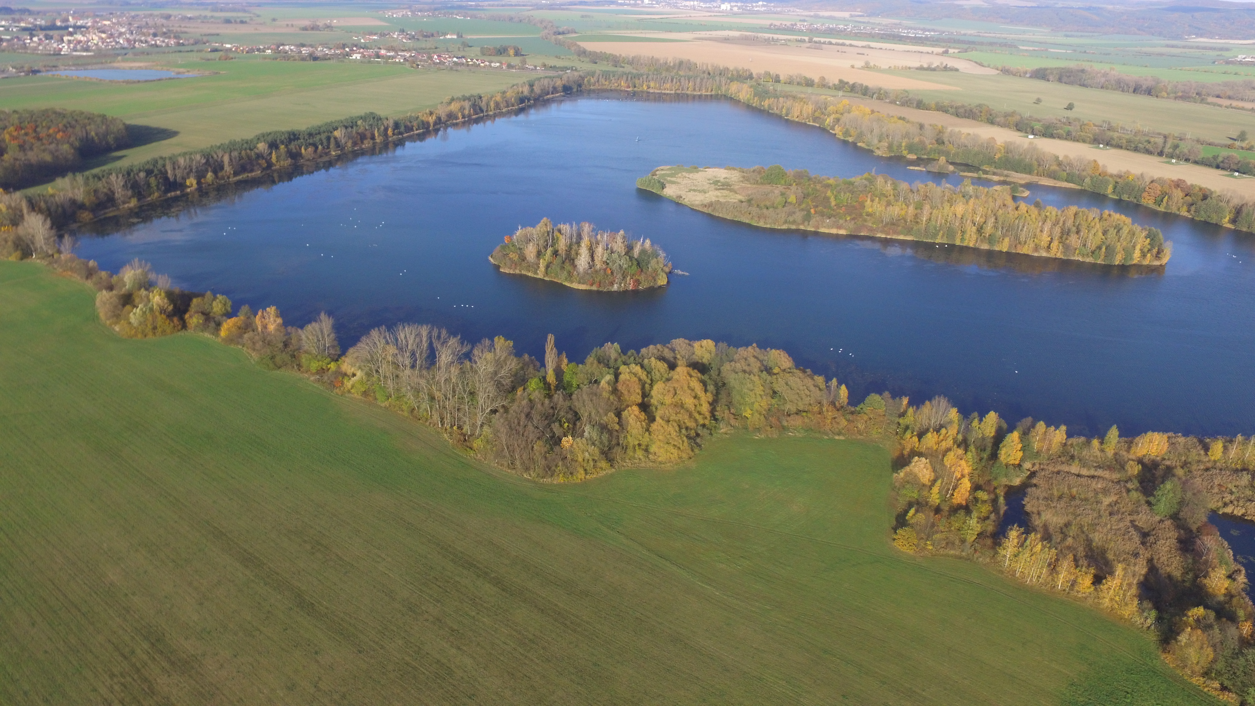 Pohled z výšky 180m